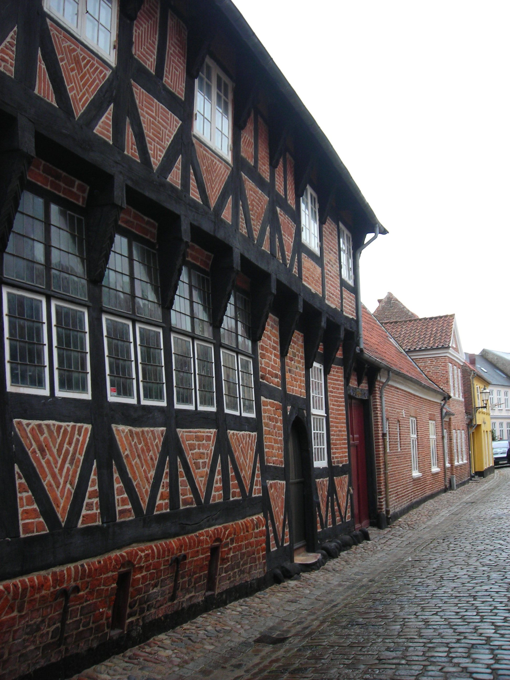 Sortebrødregadesiden af Quedens Gård i Ribe